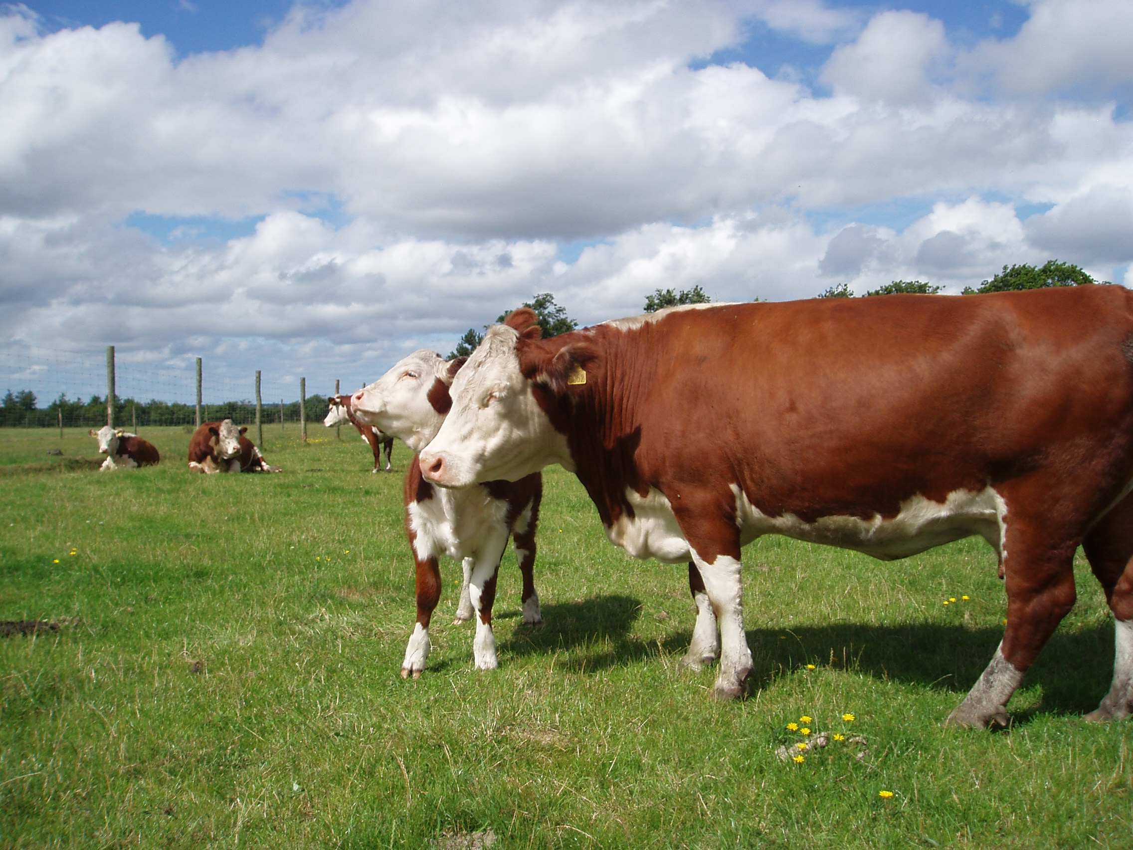 Herefordkvæg.